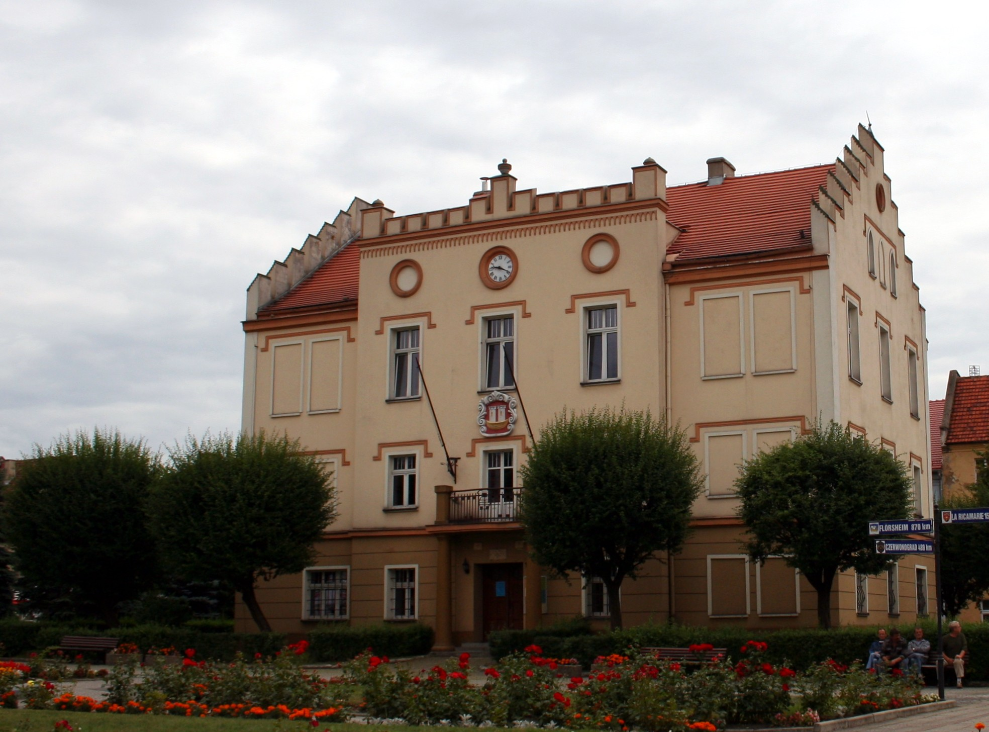 ratusz w Pyskowicach